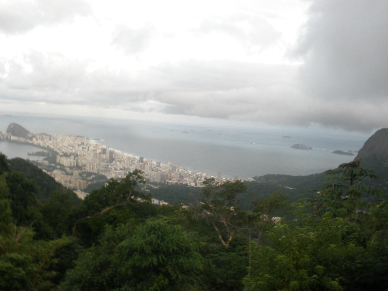 Tijuca Forest 2